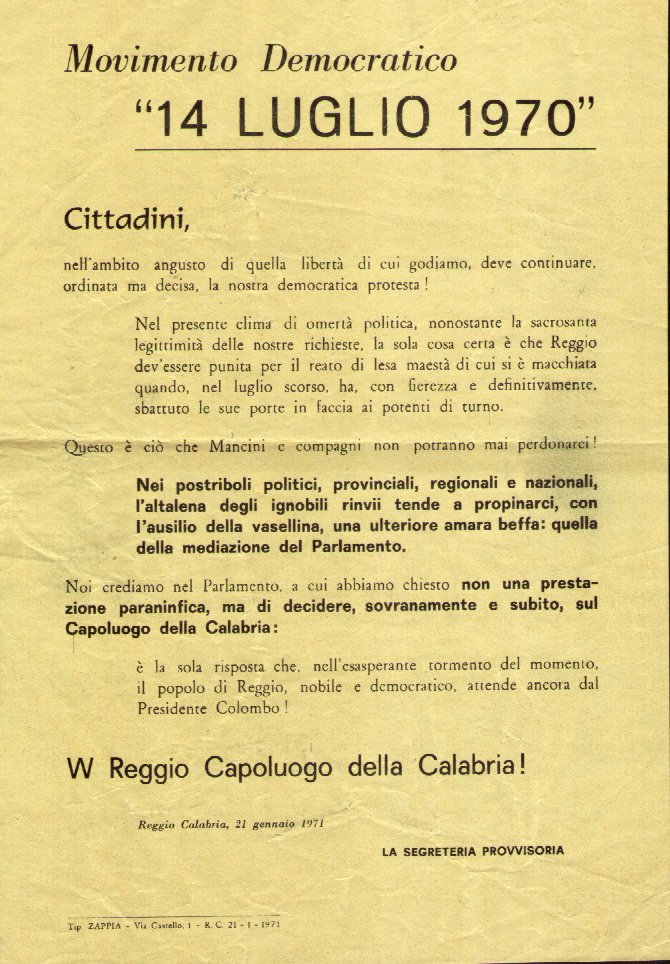 prodotto durante i Fatti di Reggio del 1970